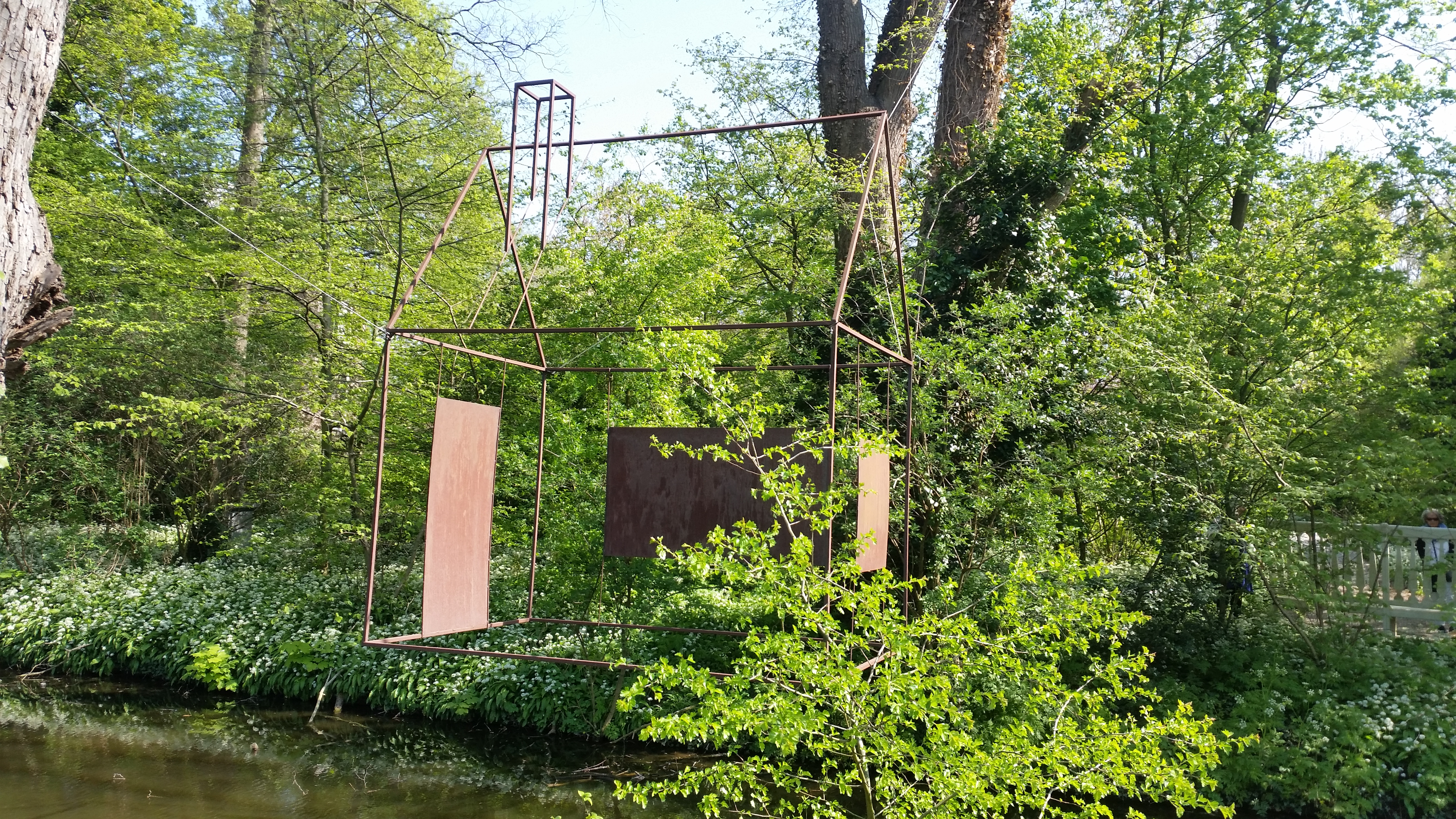 Anachoreoo van Berend Strik in Park Frankendael